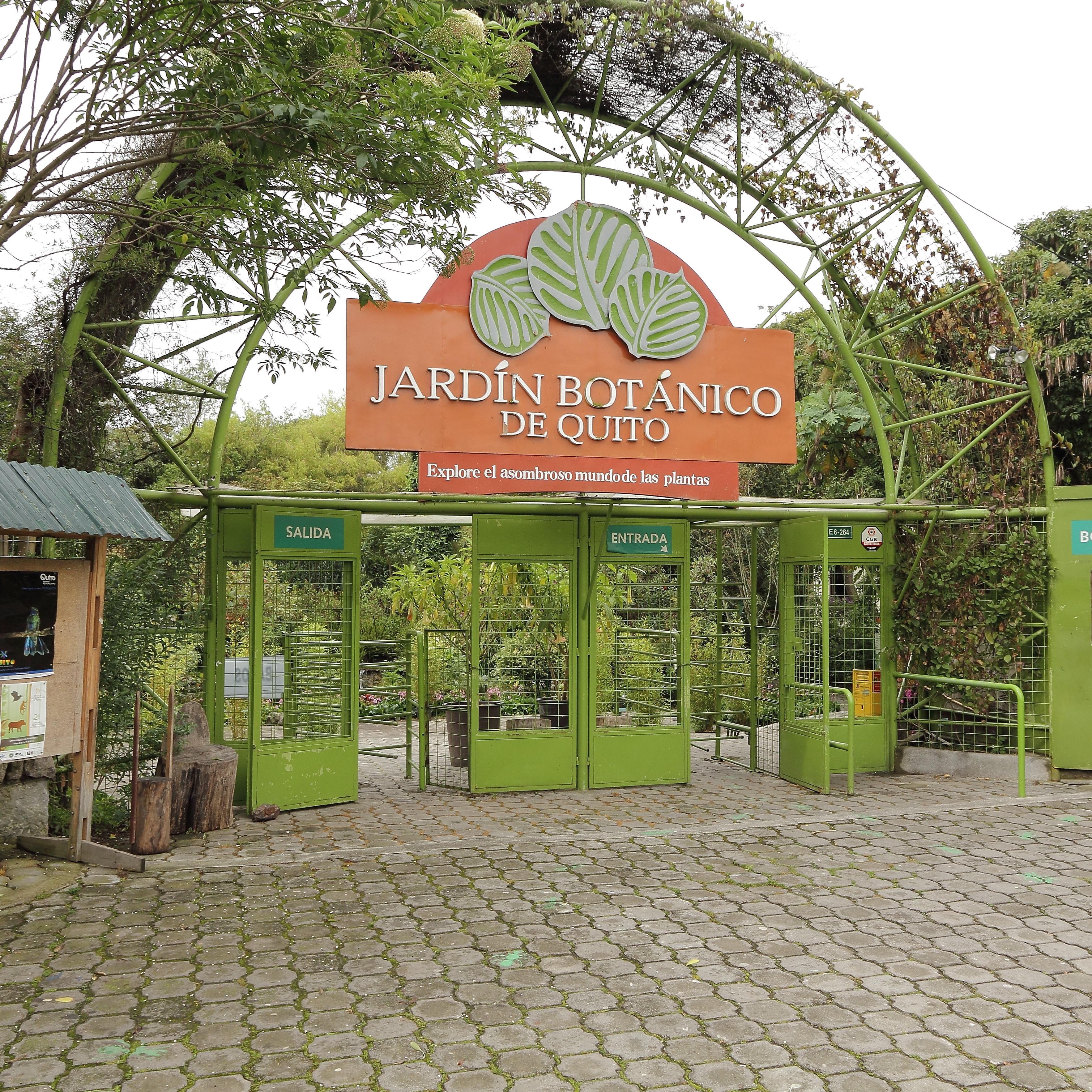 Quitos botaniska trädgård.